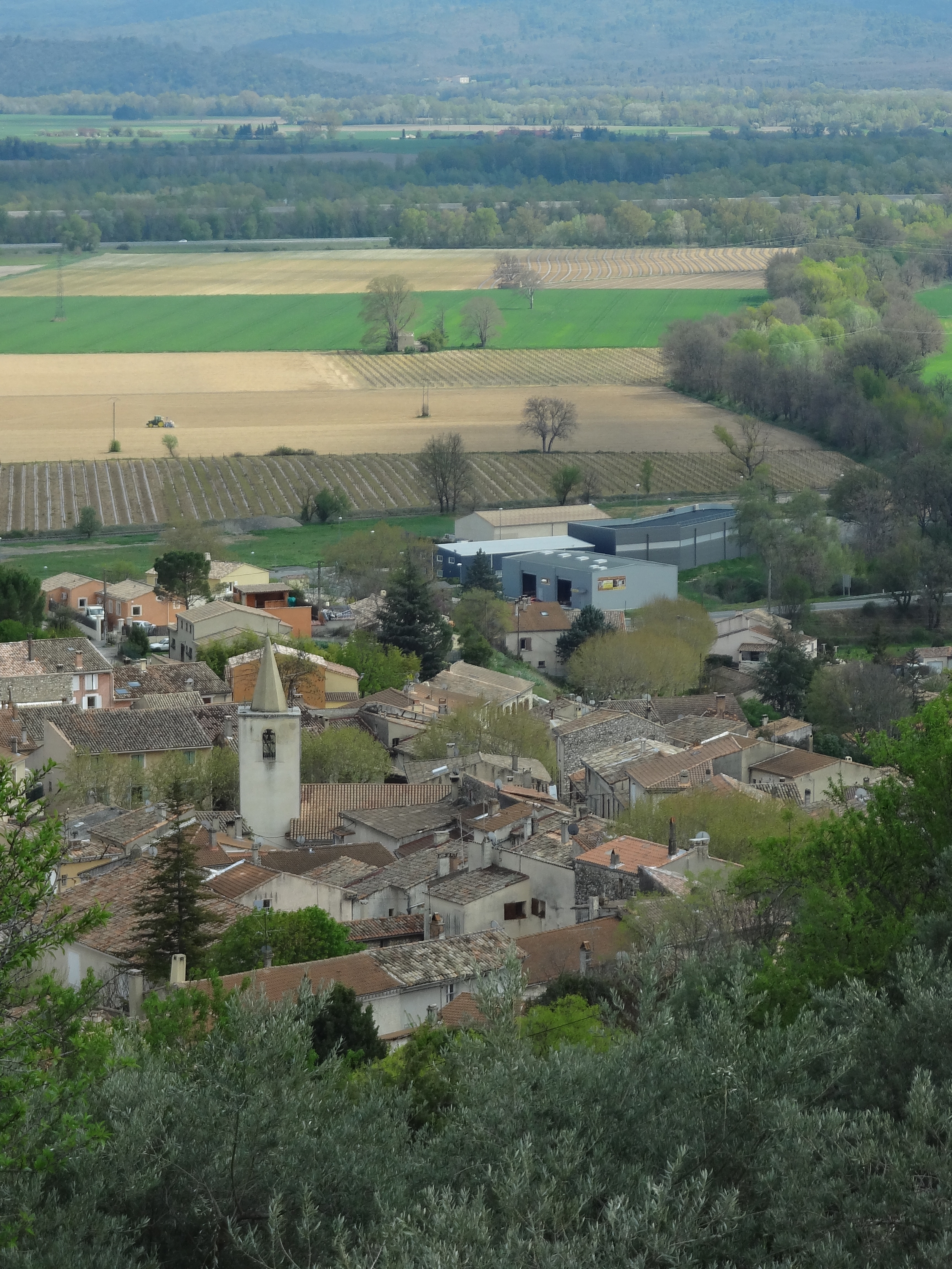 Village de Corbières-en-Provence, plaine de la Durance